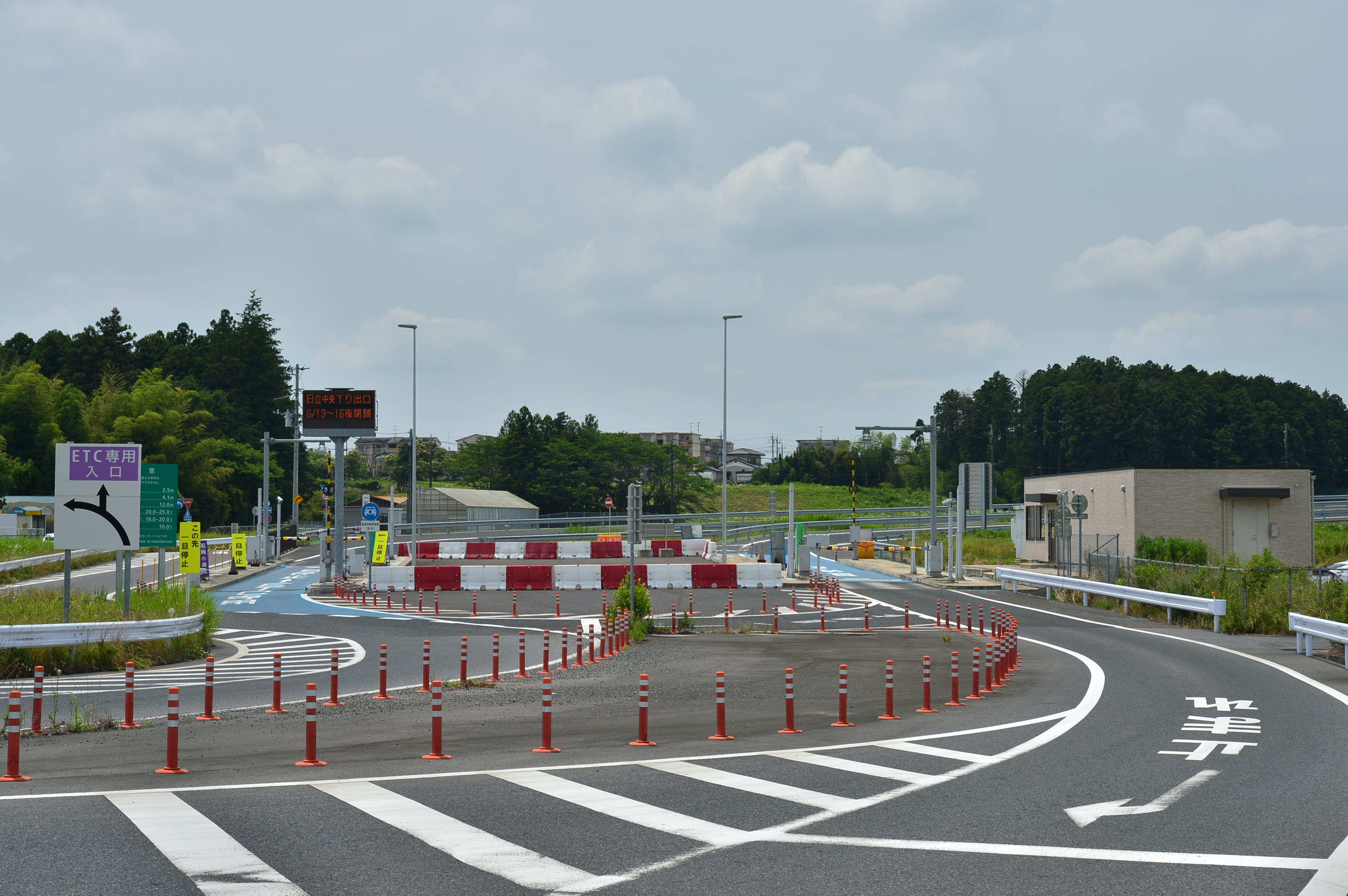 石岡小美玉スマートインターチェンジの上り線出入口ゲート。常磐自動車道の東京方面へ向うときに通過するゲート。ゲート直前の手前で、ゲートを通過せずに元来た道路へ回避する迂回路が設けられている。